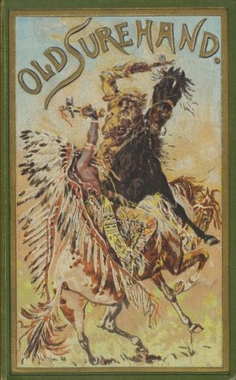 Karl May: “Old Surehand”, 1894